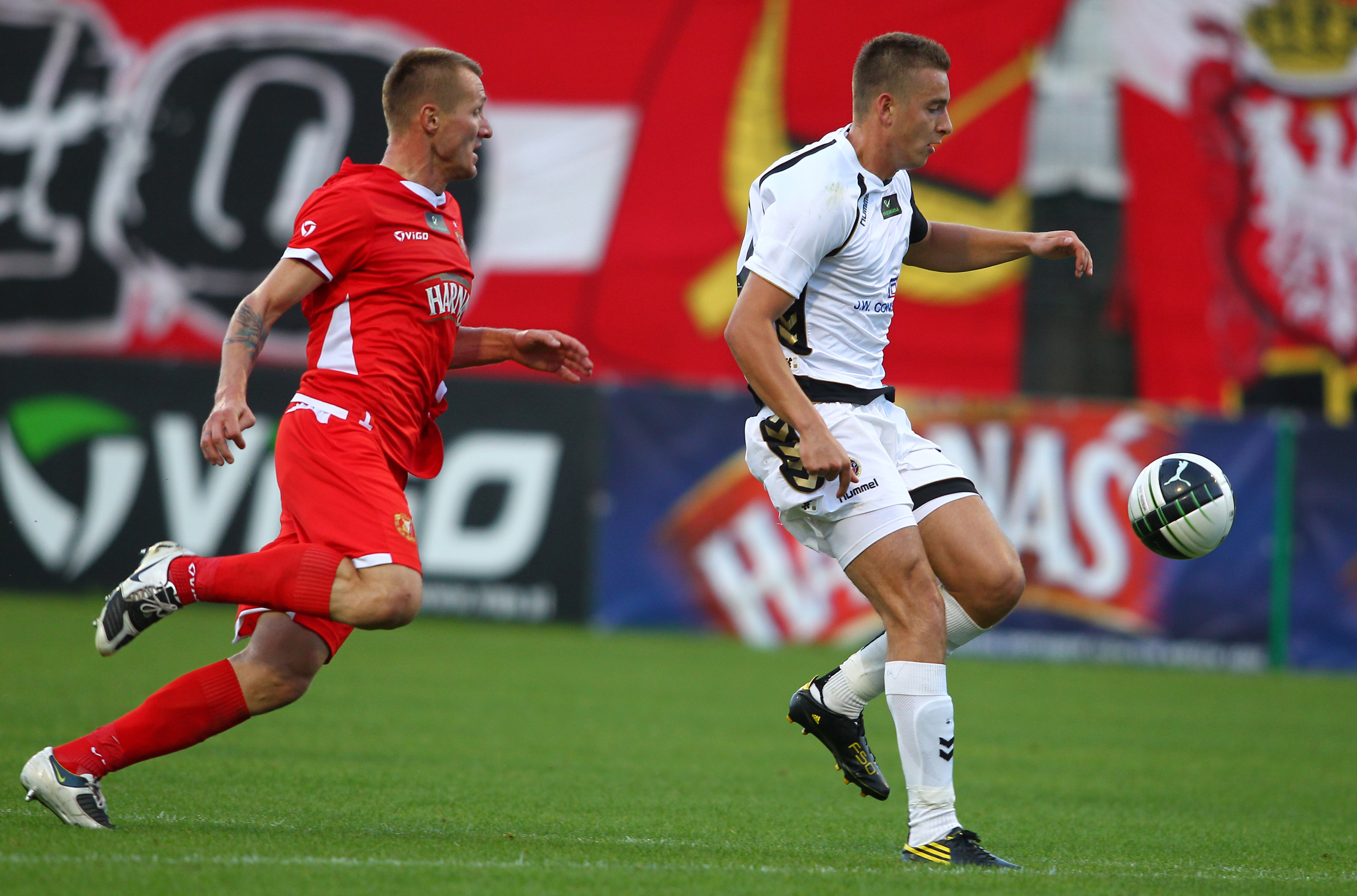 Artur Sobiech (right) of Polonia Warszawa versus Wojciech Szymanek (left) of Widzew Łódź during an Ekstraklasa match